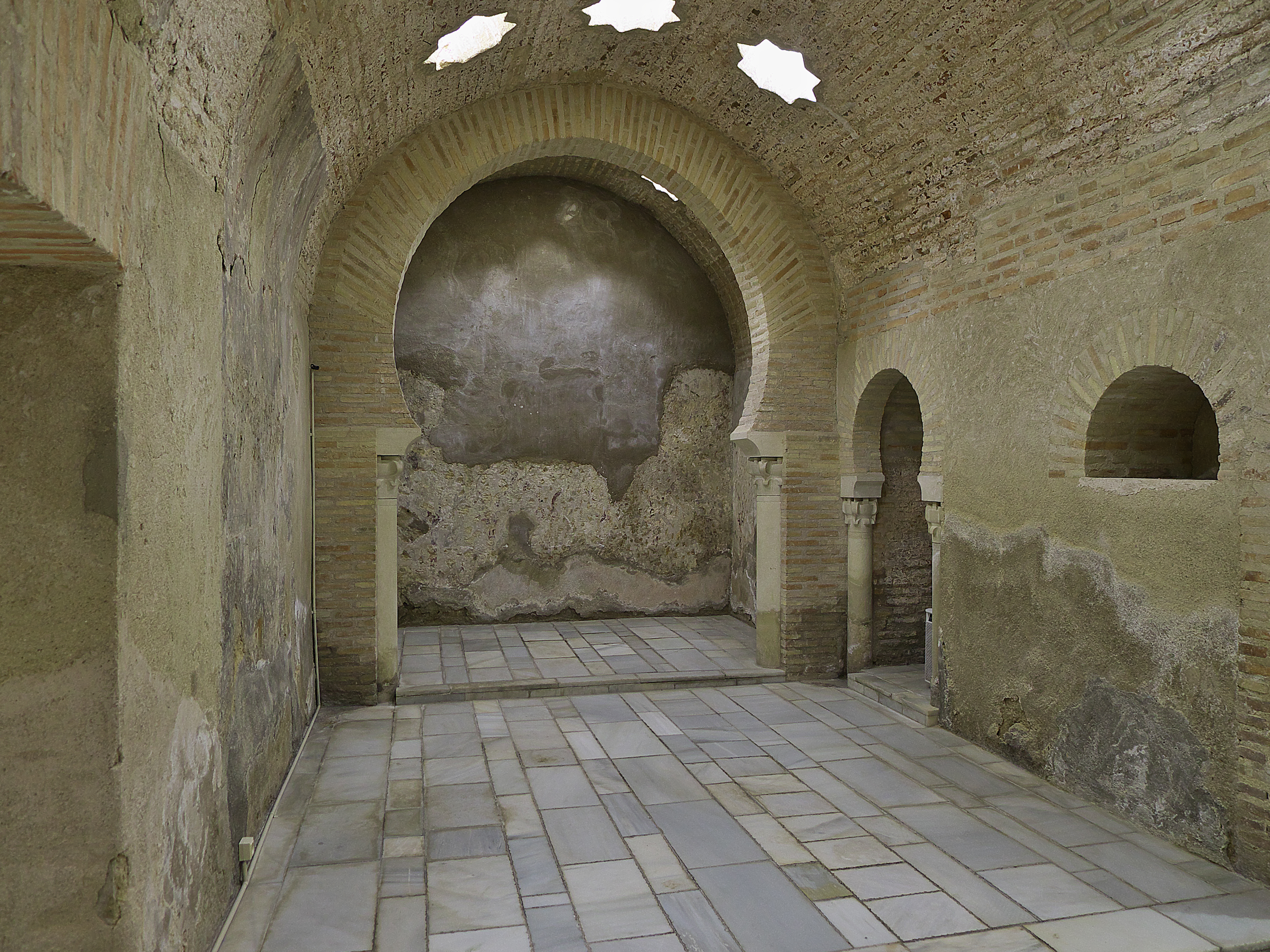 Sala rectangular con alcobas